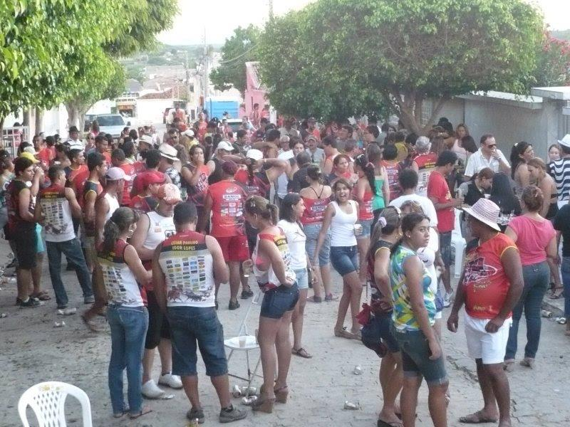 Bloco SportFolia - Ano I